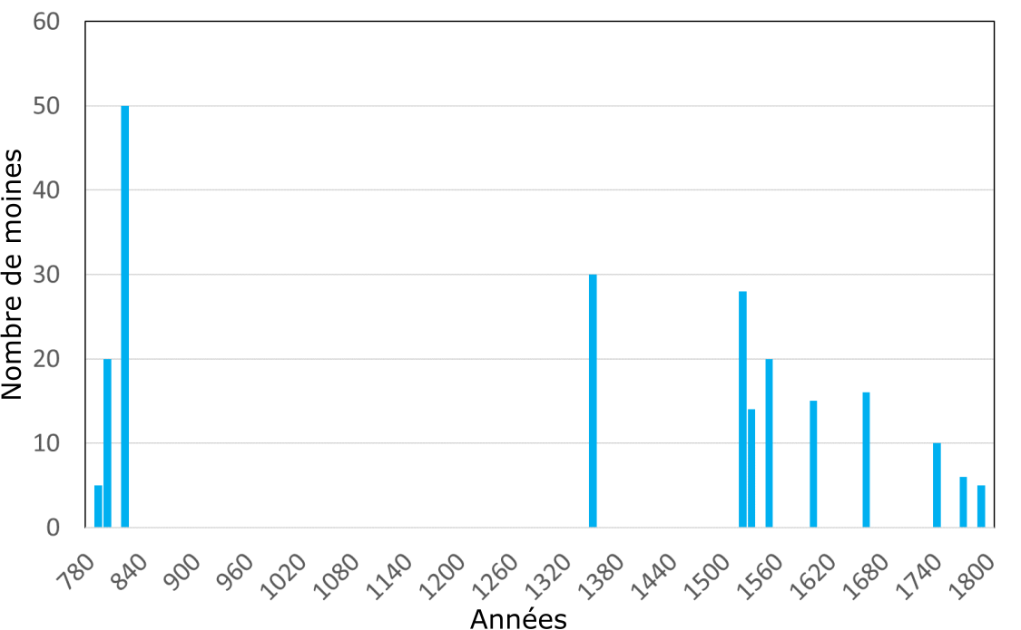 Évolution du nombre de moines de l'abbaye au cours des années.